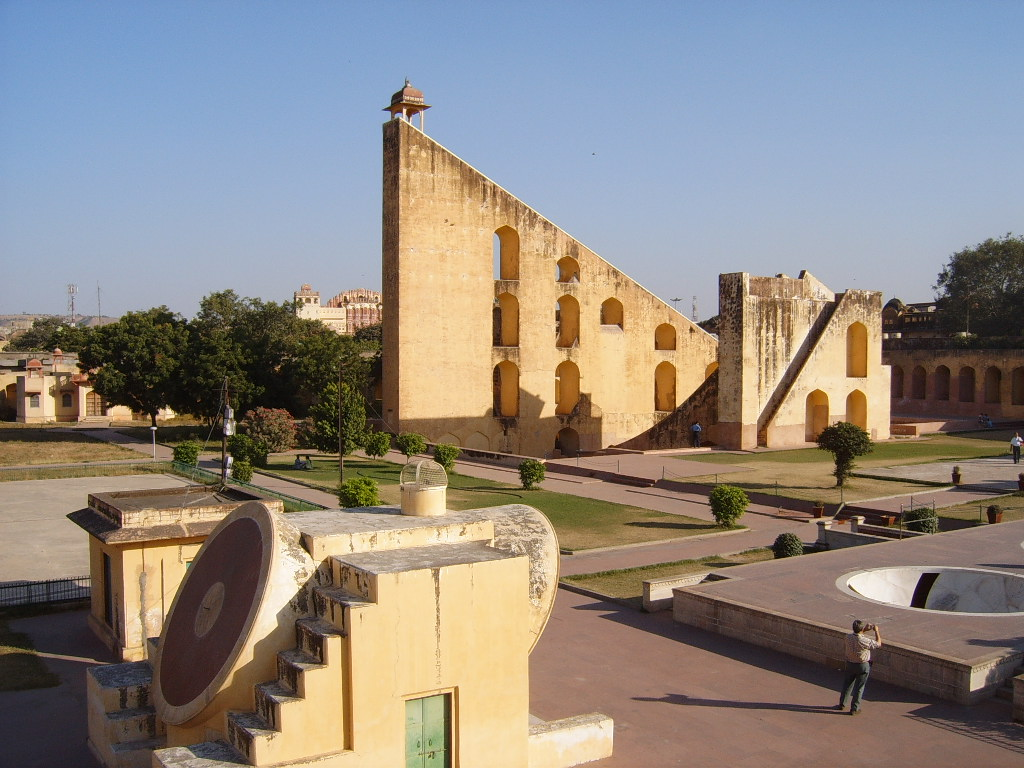 Observatoire de Jaipur, vue d'ensemble, novembre 2005. Personal picture, I set it in public domain.